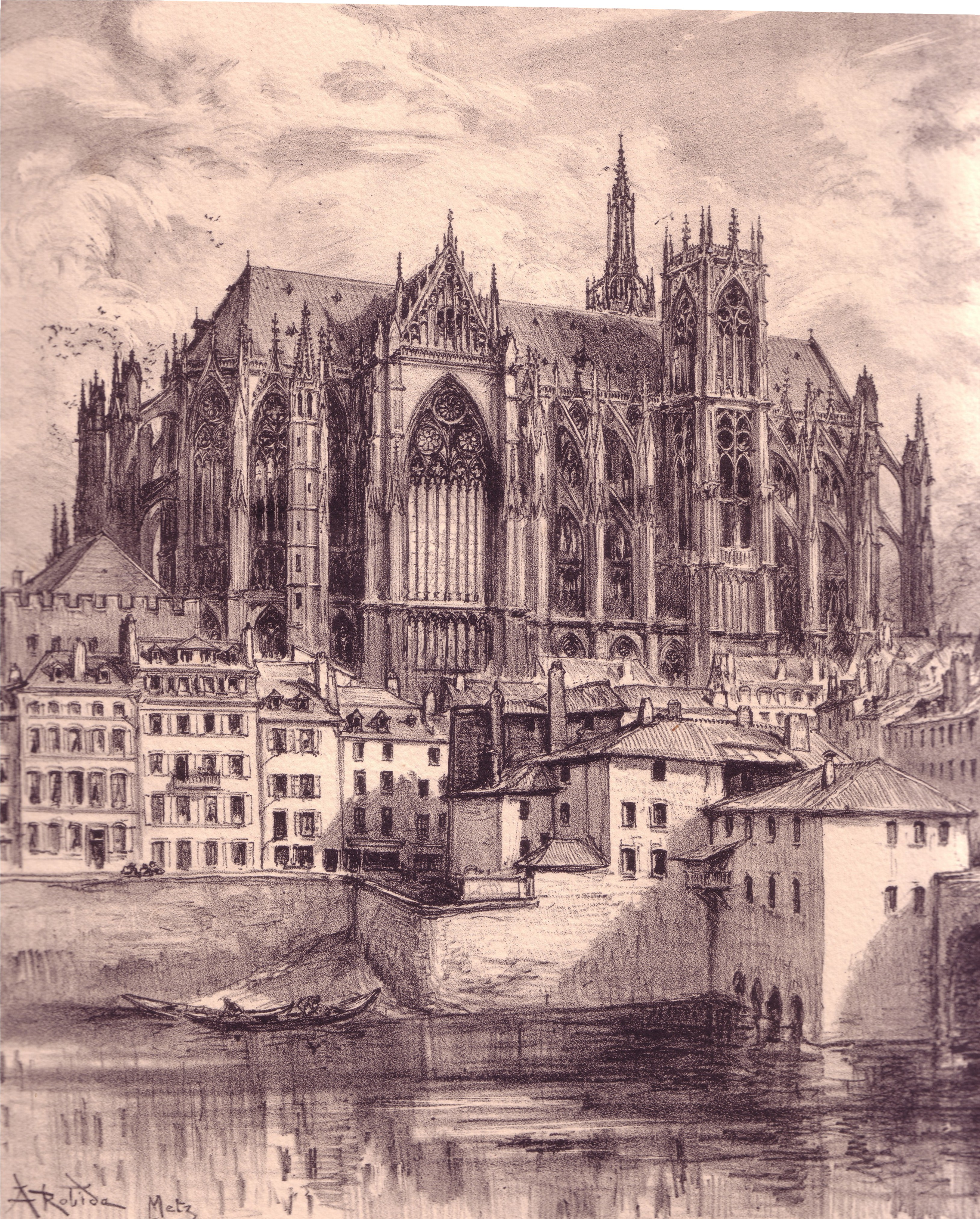 Lithographie de la cathédrale de Metz par Albert Robida